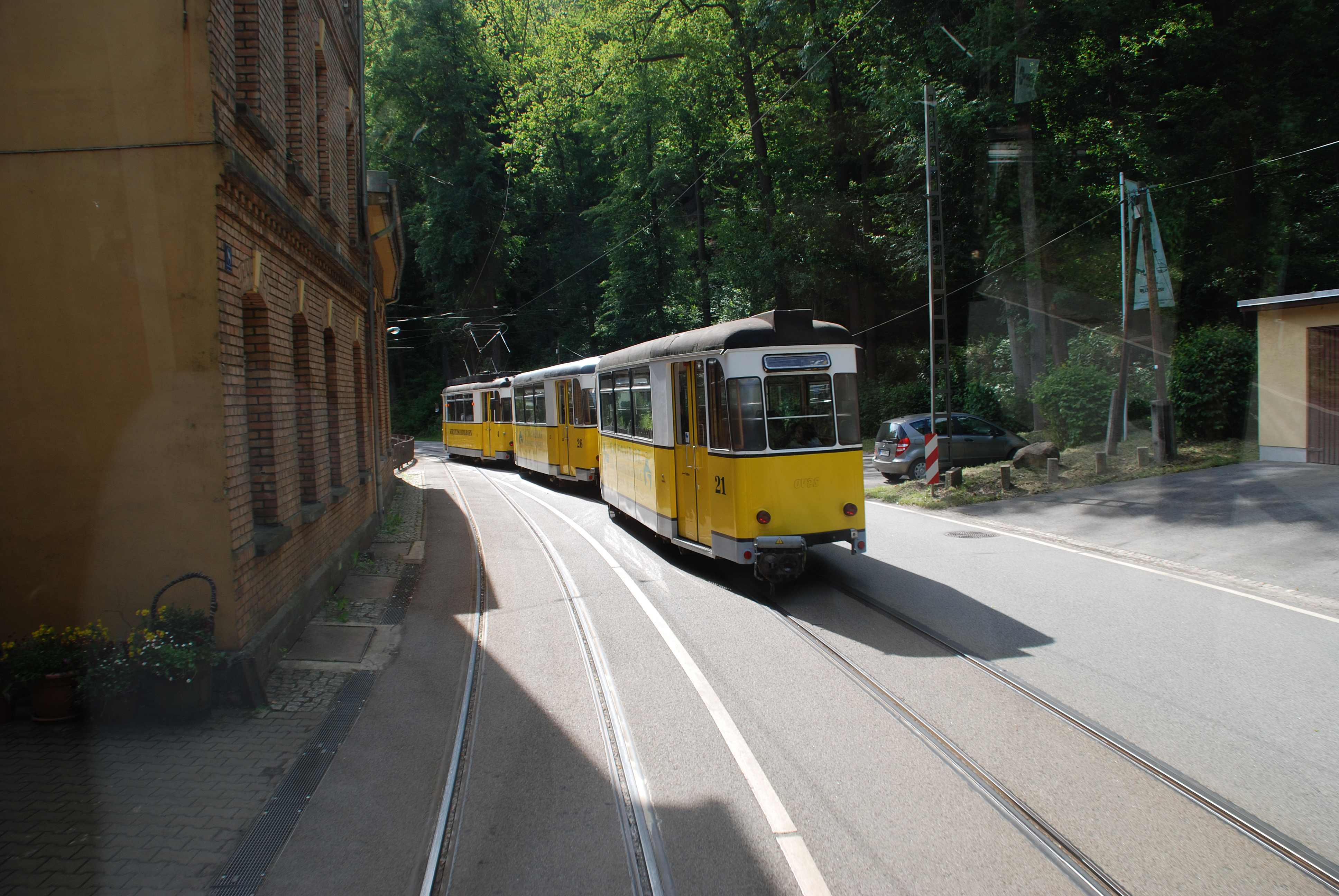 Kirnitschtalbahn